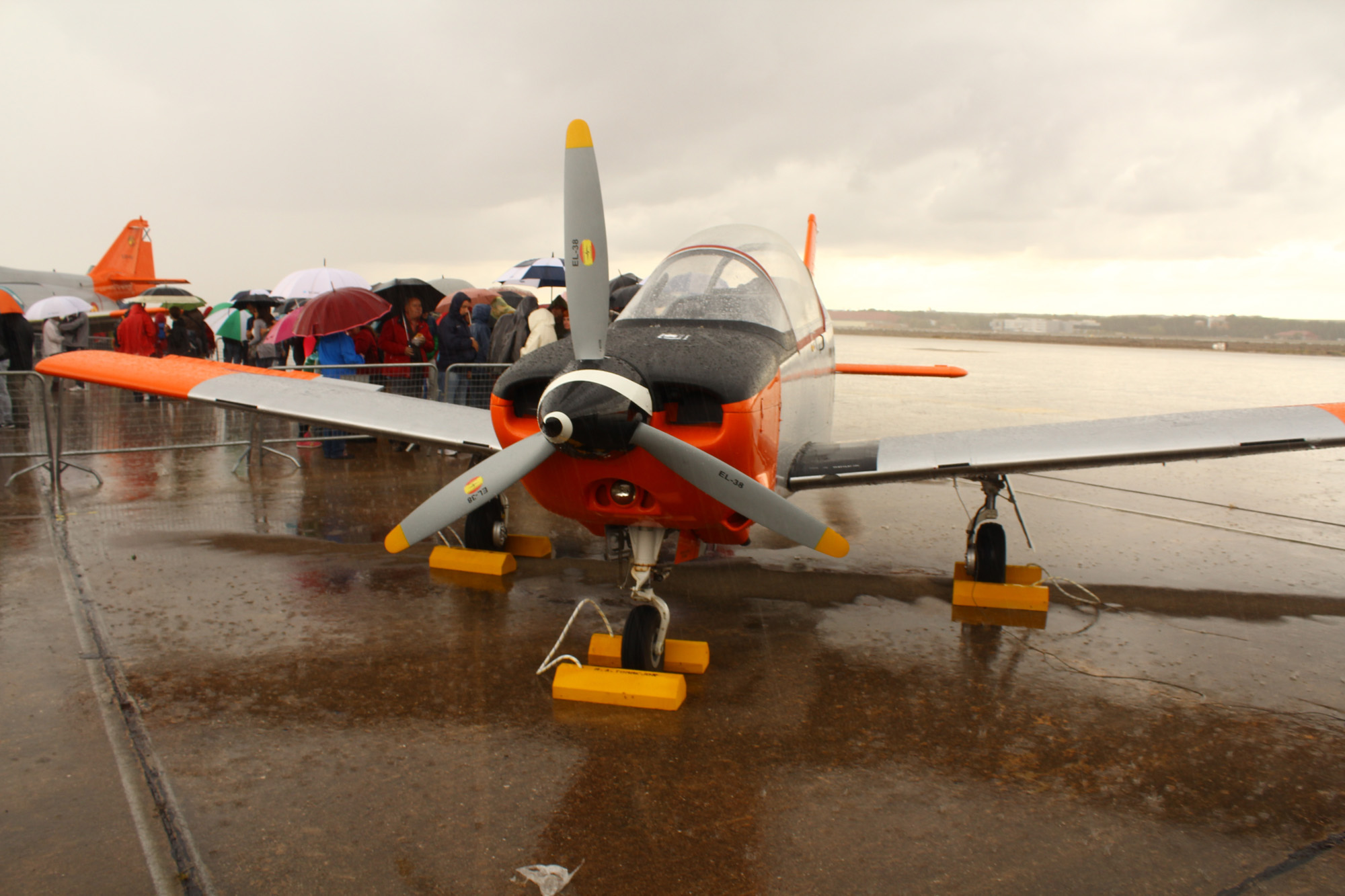 Festival Aéreo Internacional Aire75, celebrado el 11 de octubre de 2014 en la Base Aérea de Torrejón de Ardoz, Madrid, con motivo del 75º aniversario del Ejército del Aire de España. Aire75 International Airshow, held on October 11, 2014 at the Torrejón de Ardoz Air Base, Madrid, to celebrare the 75th anniversary of the Spanish Air Force.